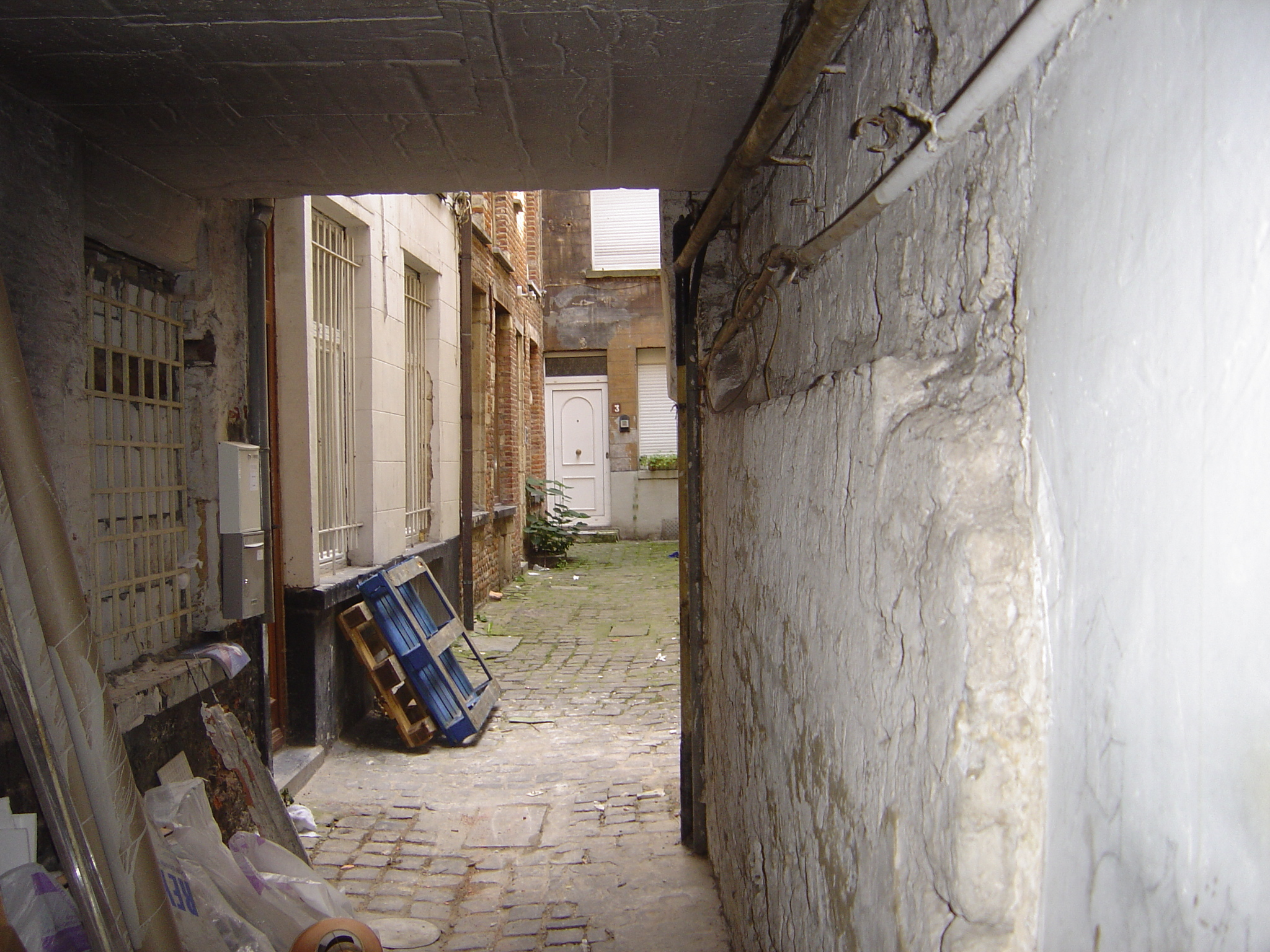 La ruelle du Dragon à Bruxelles, actuellement impasse de la Poupée, débouchant rue du Marché aux Fromages 19.